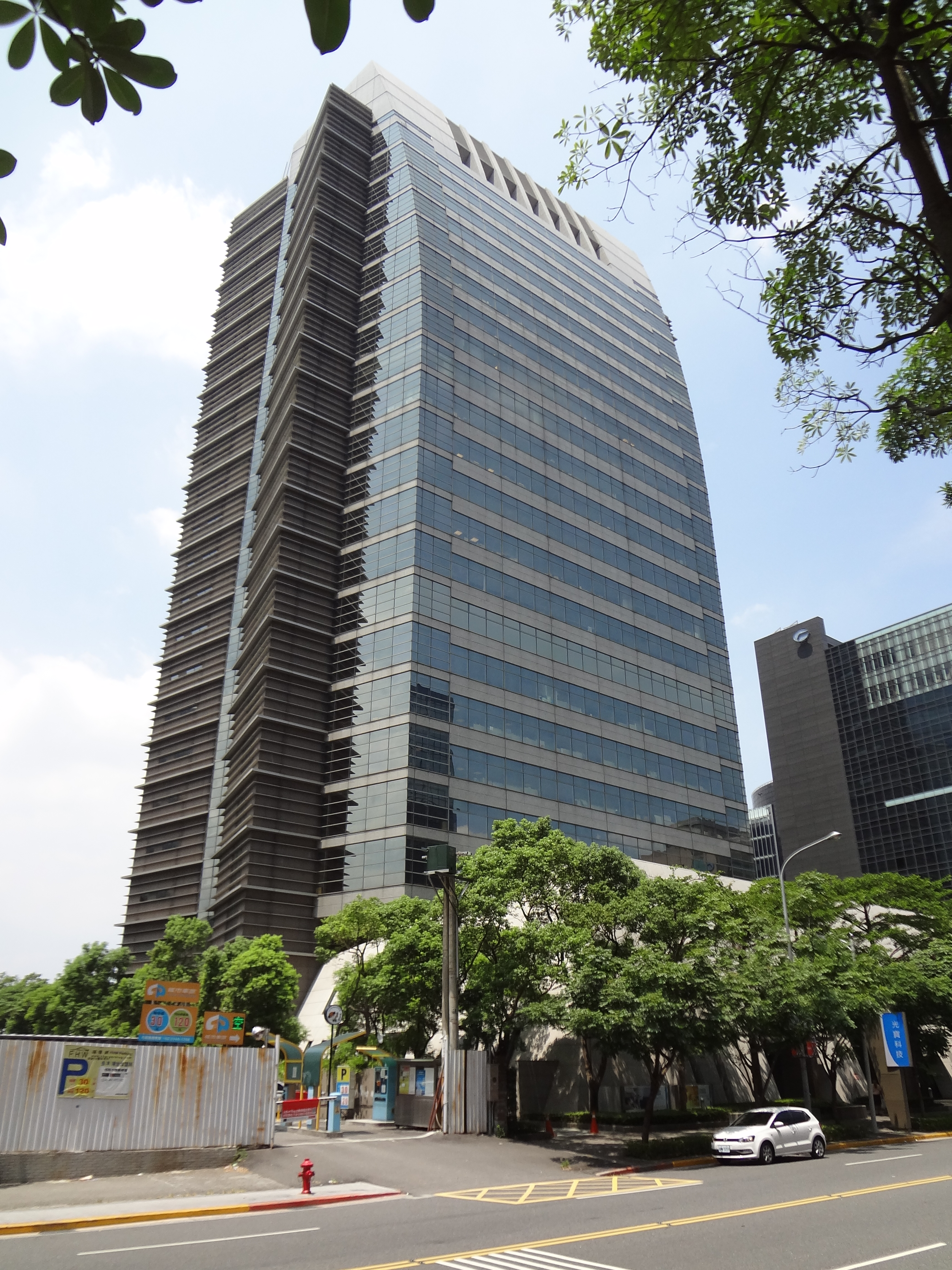 光寶科技大樓，地址：臺北市內湖區瑞光路392、394號。